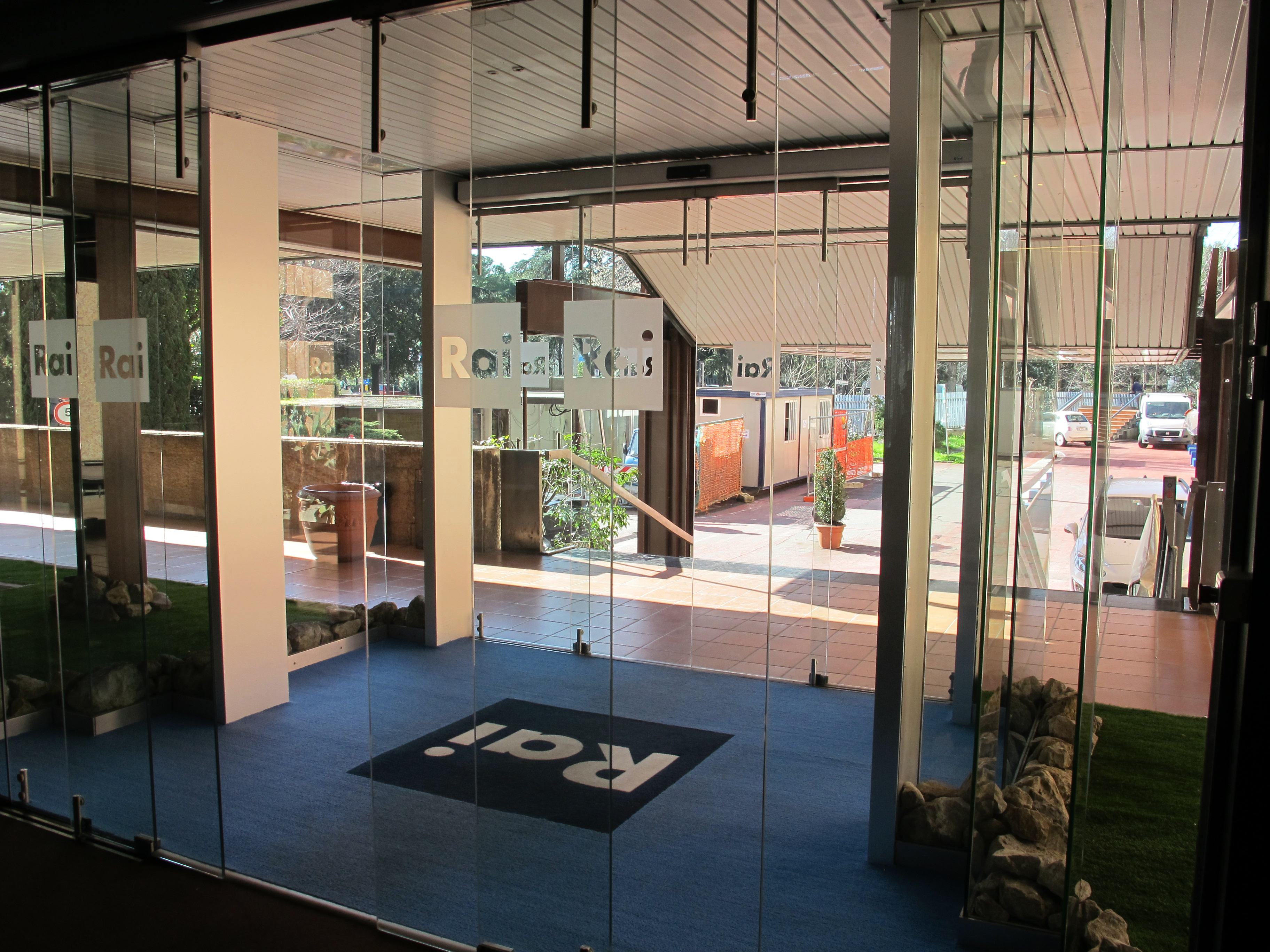 RAI (Firenze)